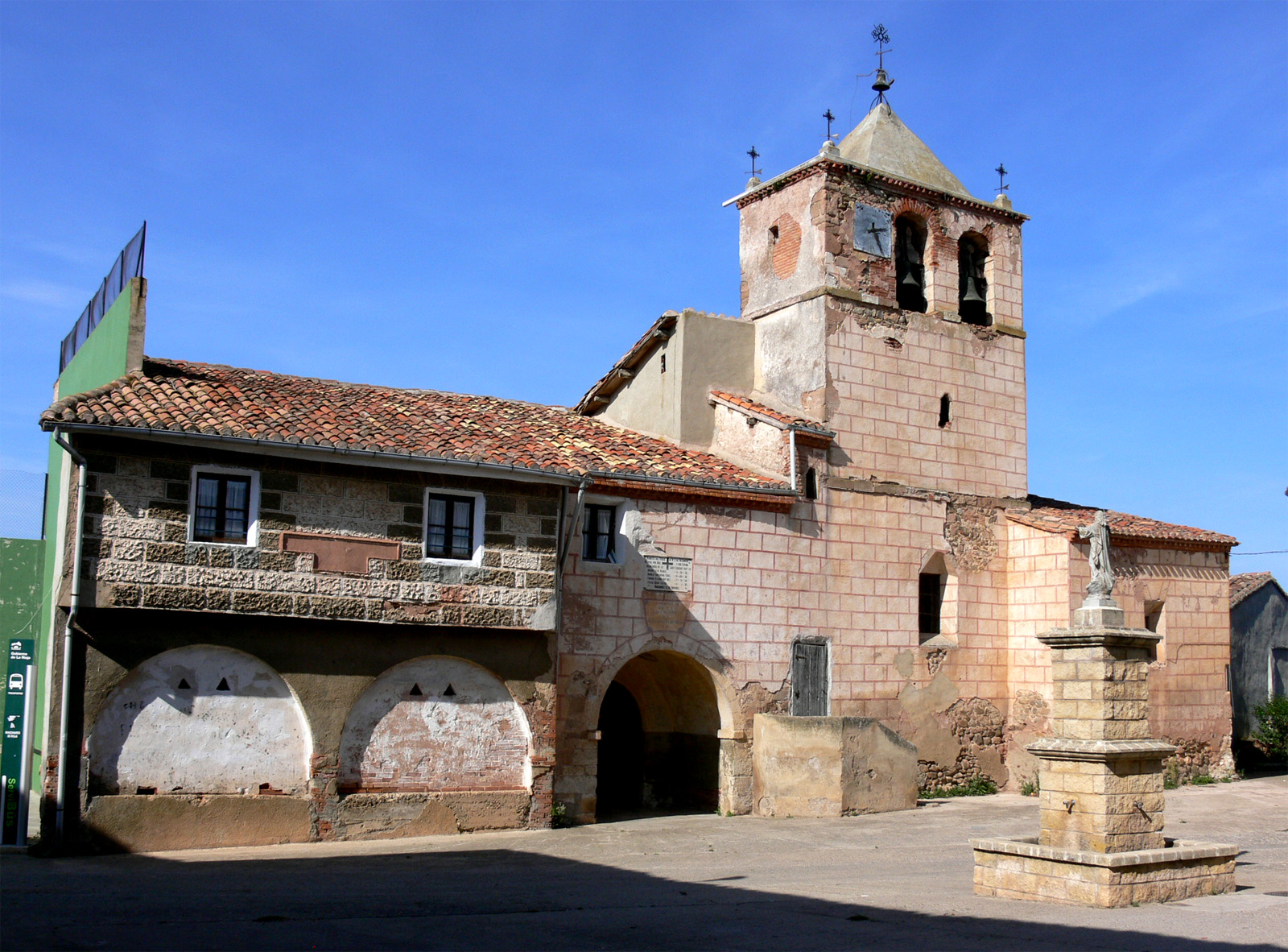 Iglesia de la Asunción en Manzanares de Rioja (España)